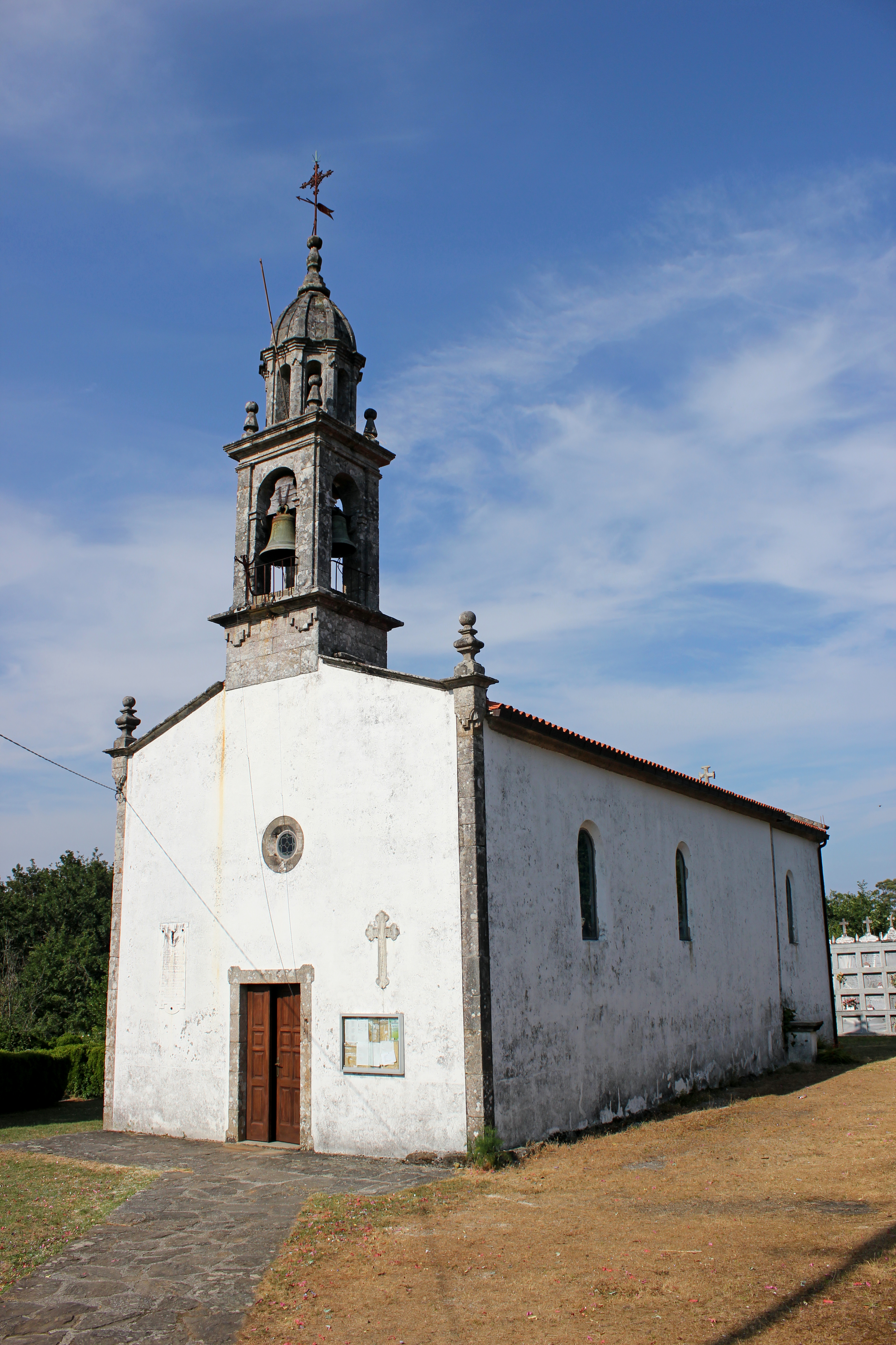 Igrexa de Vilar no concello de Touro.